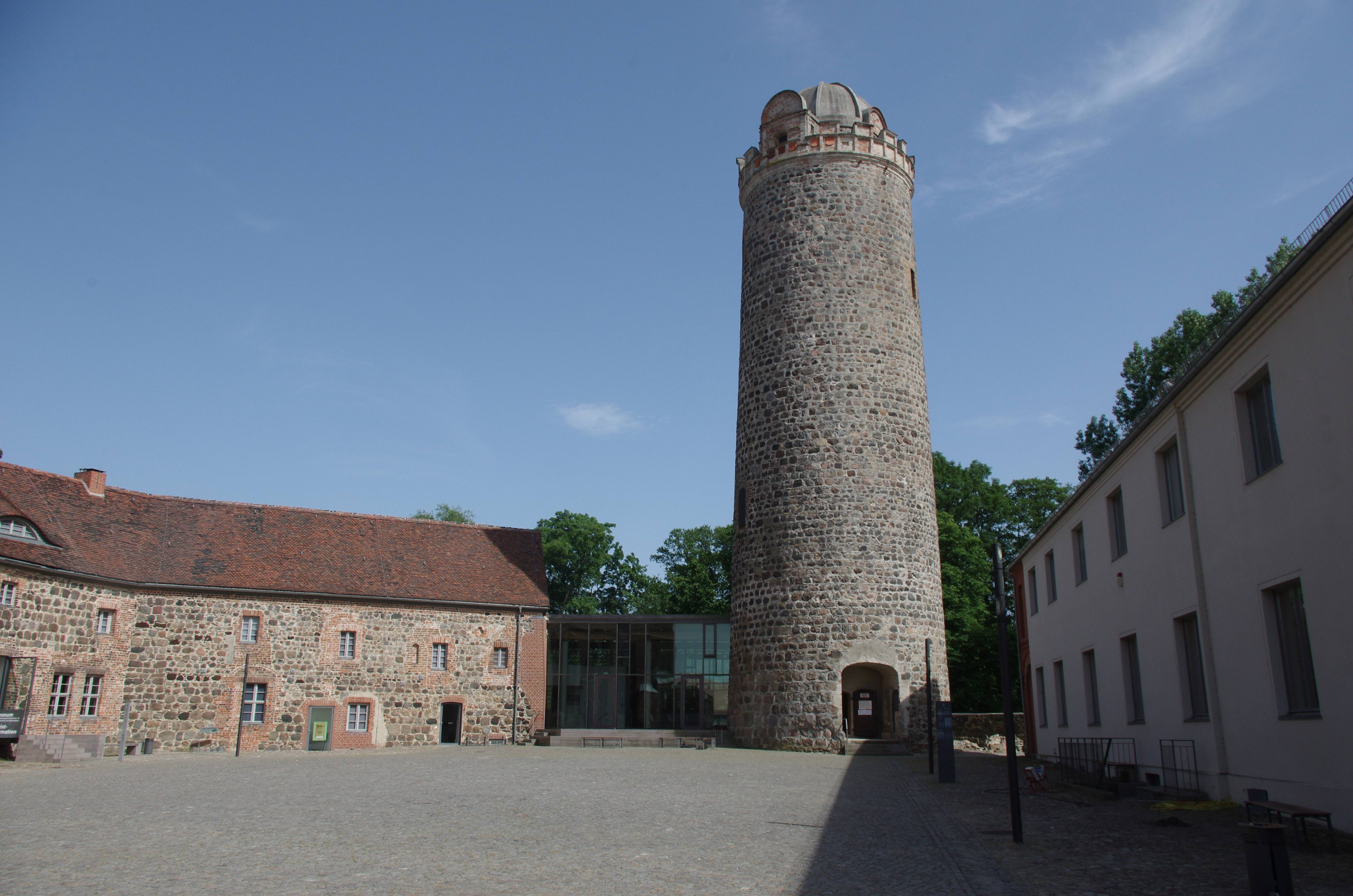 Ziesar in Brandenburg. Die Burg steht unter Denkmalschutz. Die Burg wurde ab dem 10. Jahrhundert erbaut. Heute ist dort ein Museum.